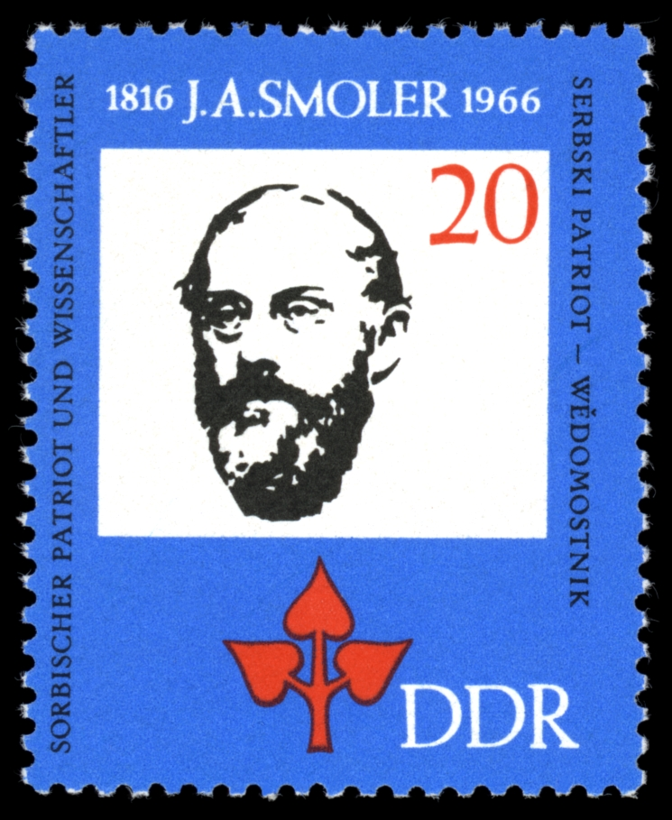 Information: Ausgabepreis: First Day of Issue / Erstausgabetag: Auflage: Entwurf: Druckverfahren: Michel-Katalog-Nr: Ländercode-MiNr